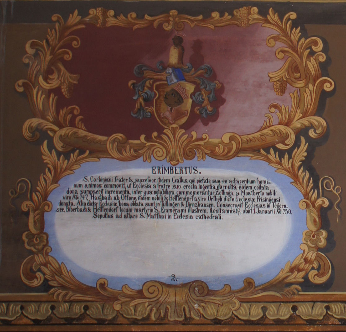 Wappentafel von Erembert, Bischof von Freising, im Fürstengang zwischen Fürstbischöflicher Residenz und Freisinger Dom. Oben das (geistliche) Wappen, darunter ein lateinischer Text mit kurzer Biographie.